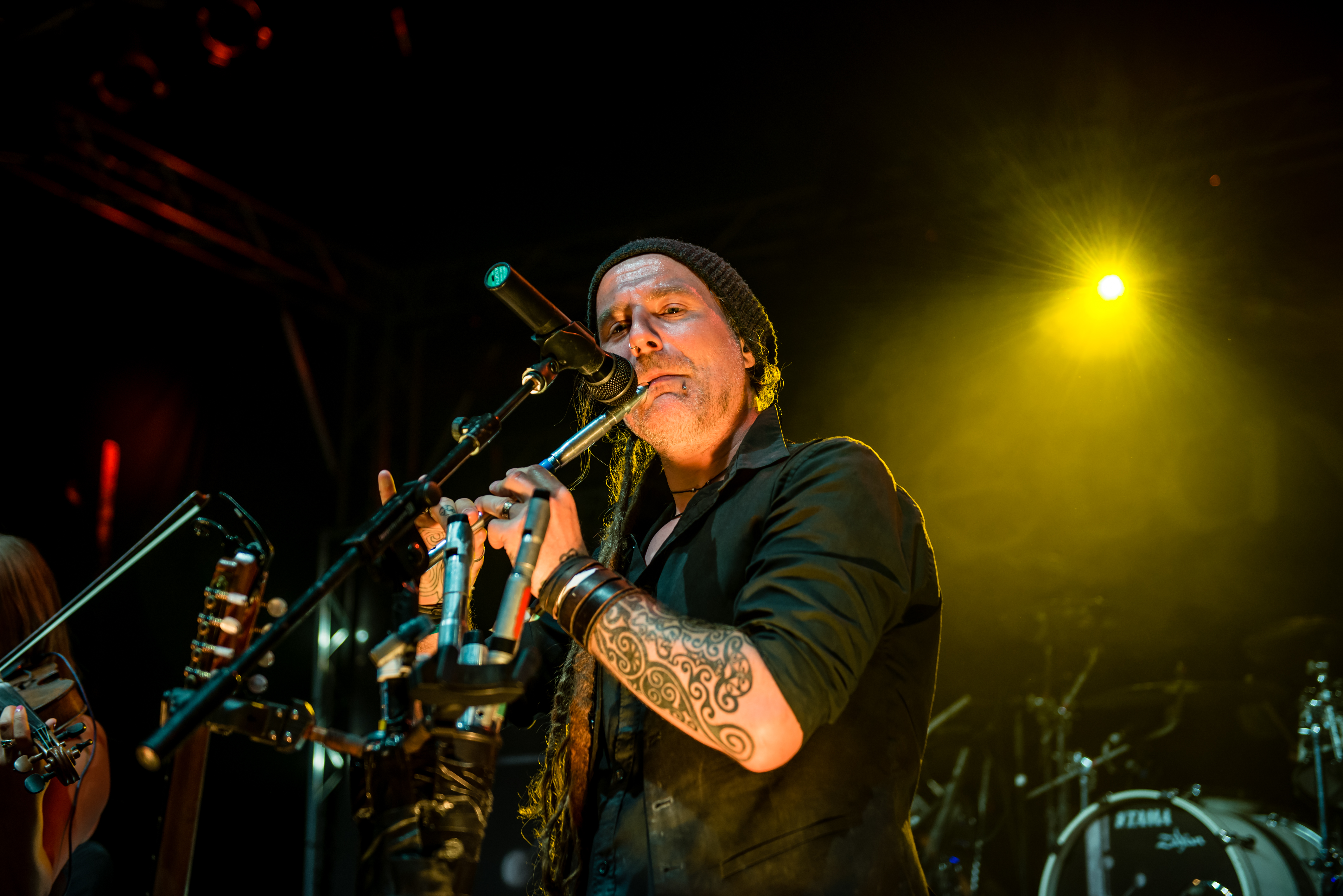 'Dong Open Air 2015; Neukirchen-Vluyn Halde Norddeutschland': 'Eluveitie'